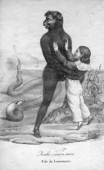 Laurençon dans Jocko ou le Singe du Brésil